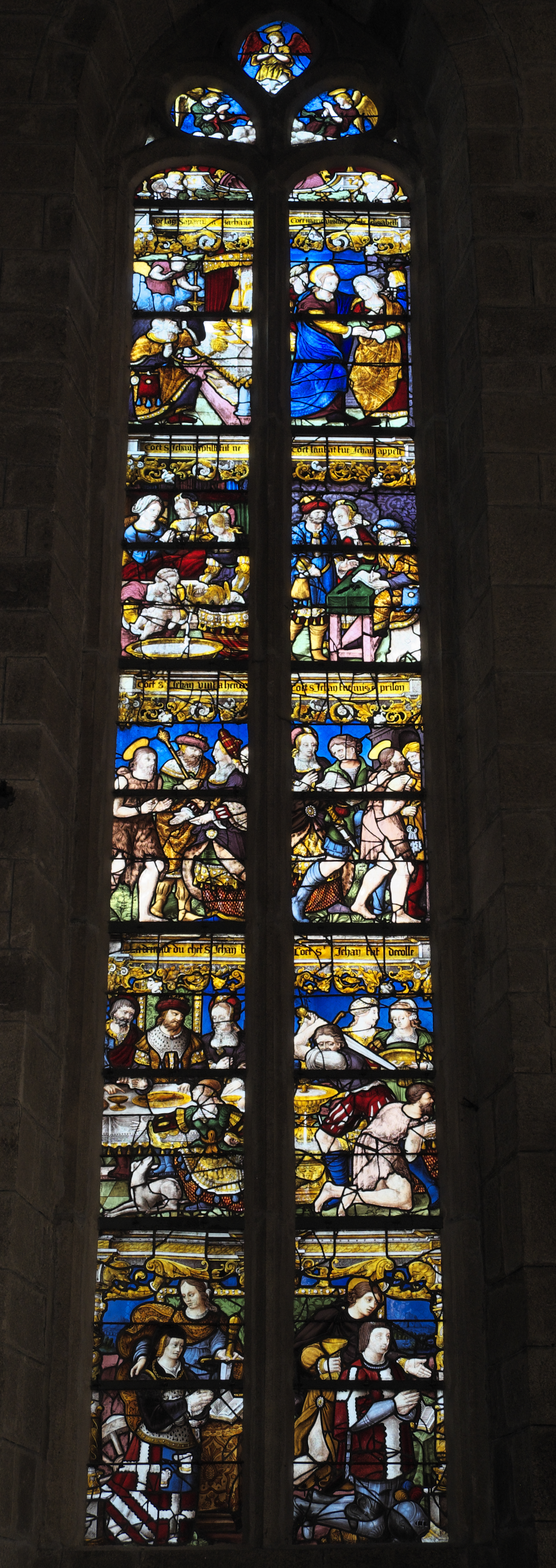 Leben Johannes des Täufers (baie 3) in der katholischen Pfarrkirche St-Mathurin in Moncontour im Département Côtes-d’Armor (Region Bretagne/Frankreich), Bleiglasfenster von 1535 bis 1540